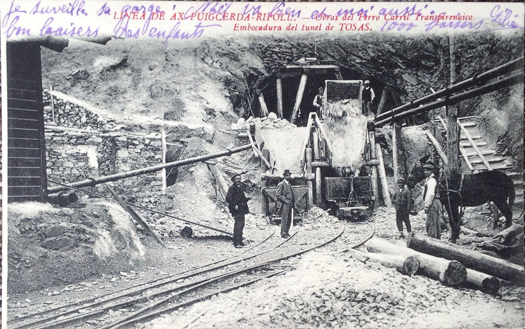 Construcció túnel de Toses. Gentilesa arxiu Palau-Costa